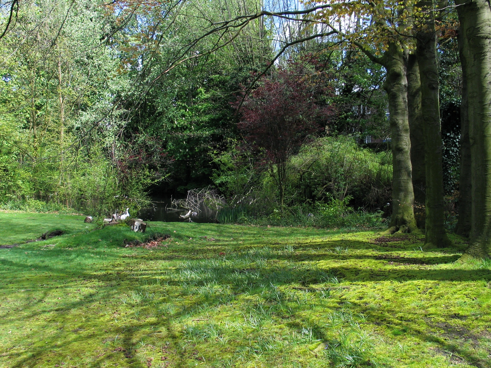 foto van het het enige stuk Groenebeek dat er nog rest in Kortrijk